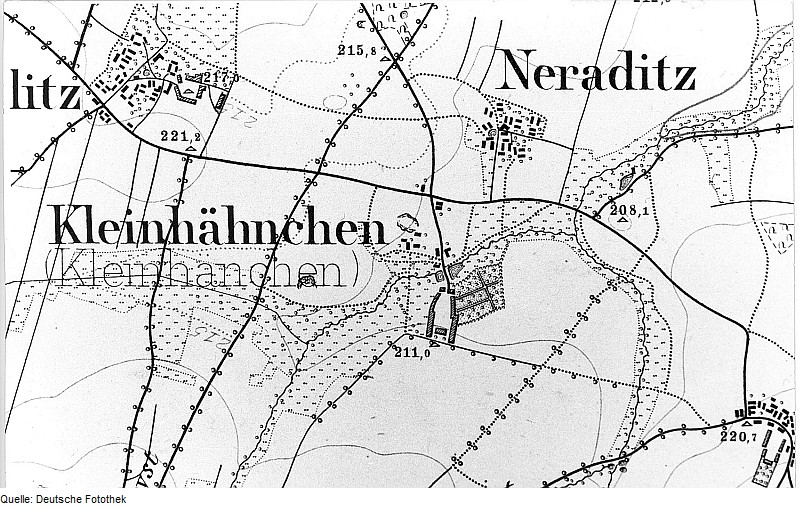 Original image description from the Deutsche Fotothek Burkau-Kleinhänchen. Meßtischblatt, Sekt. Kloster Marienstern, 1884